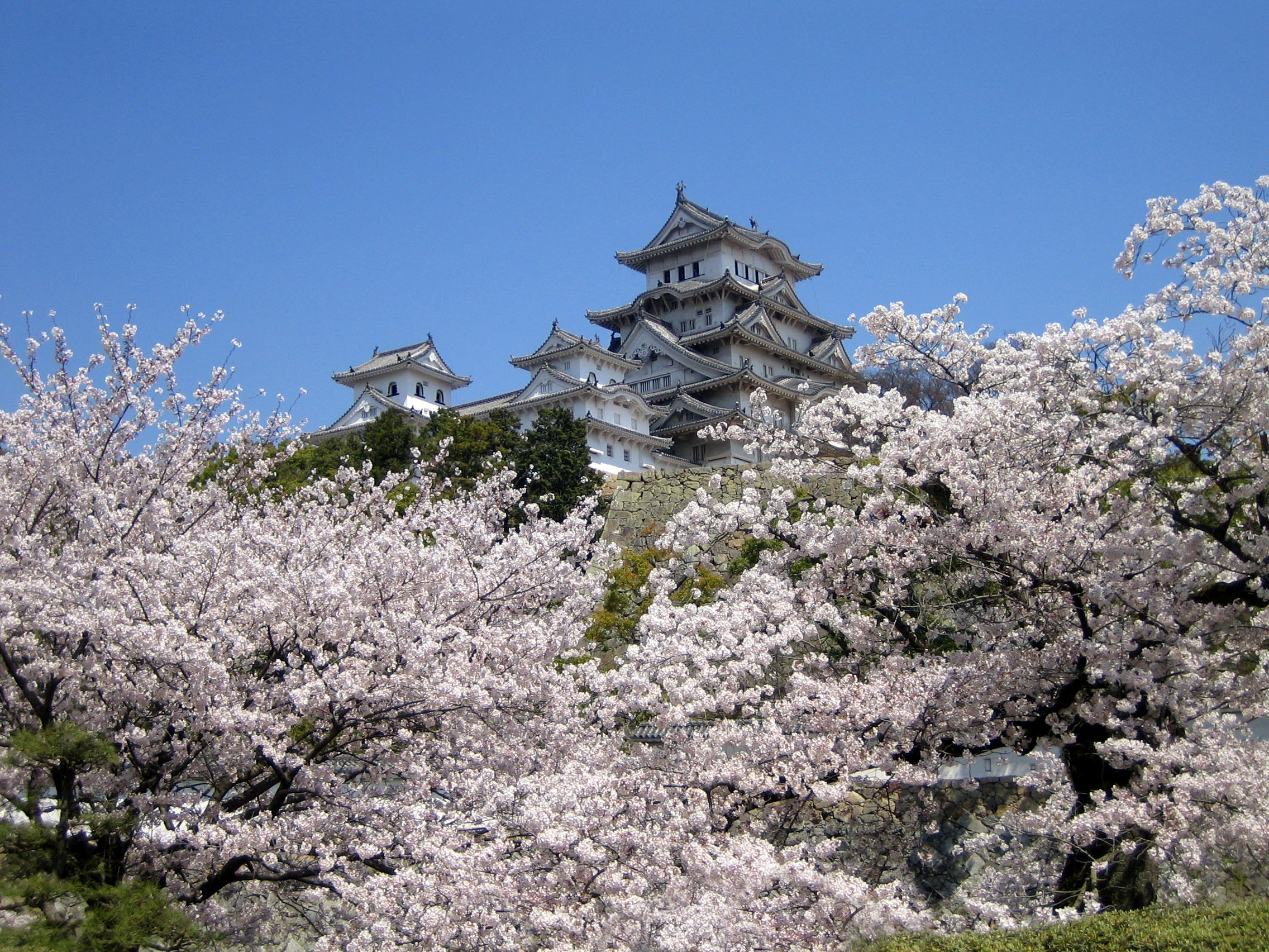 桜満開の姫路城 菱の門から